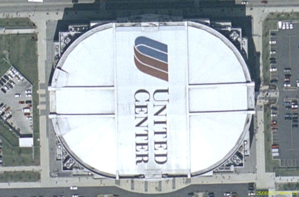 Image satellite du United Center de Chicago Source Image USGS provenant de Nasa World Wind